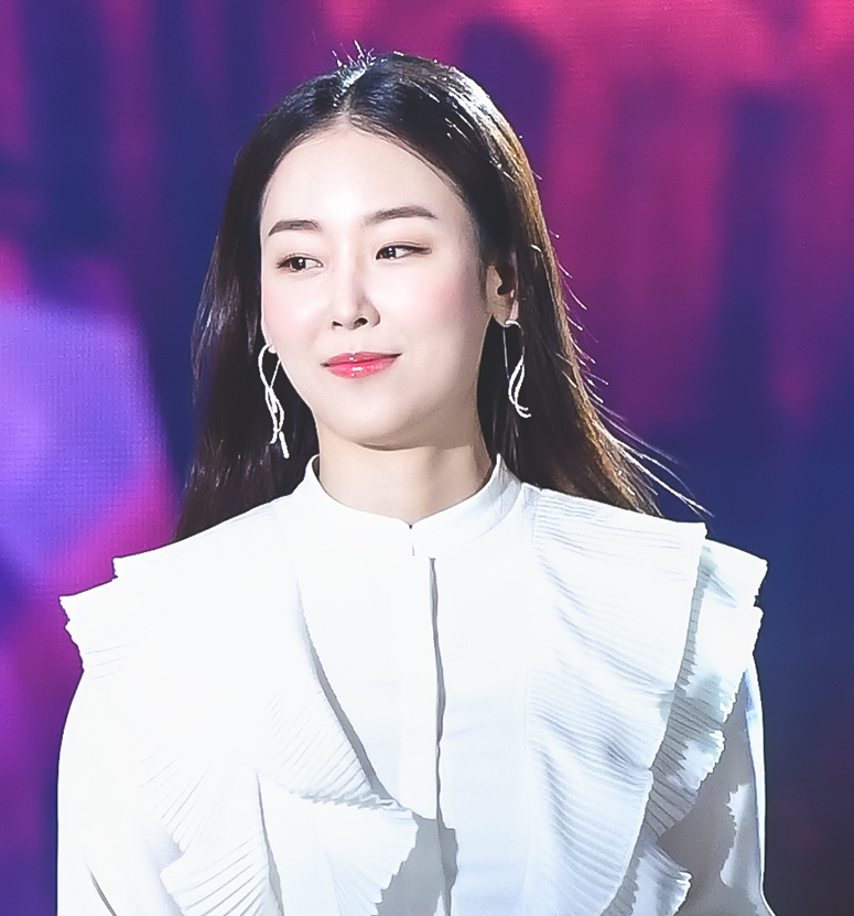 180503 54회 백상예술대상